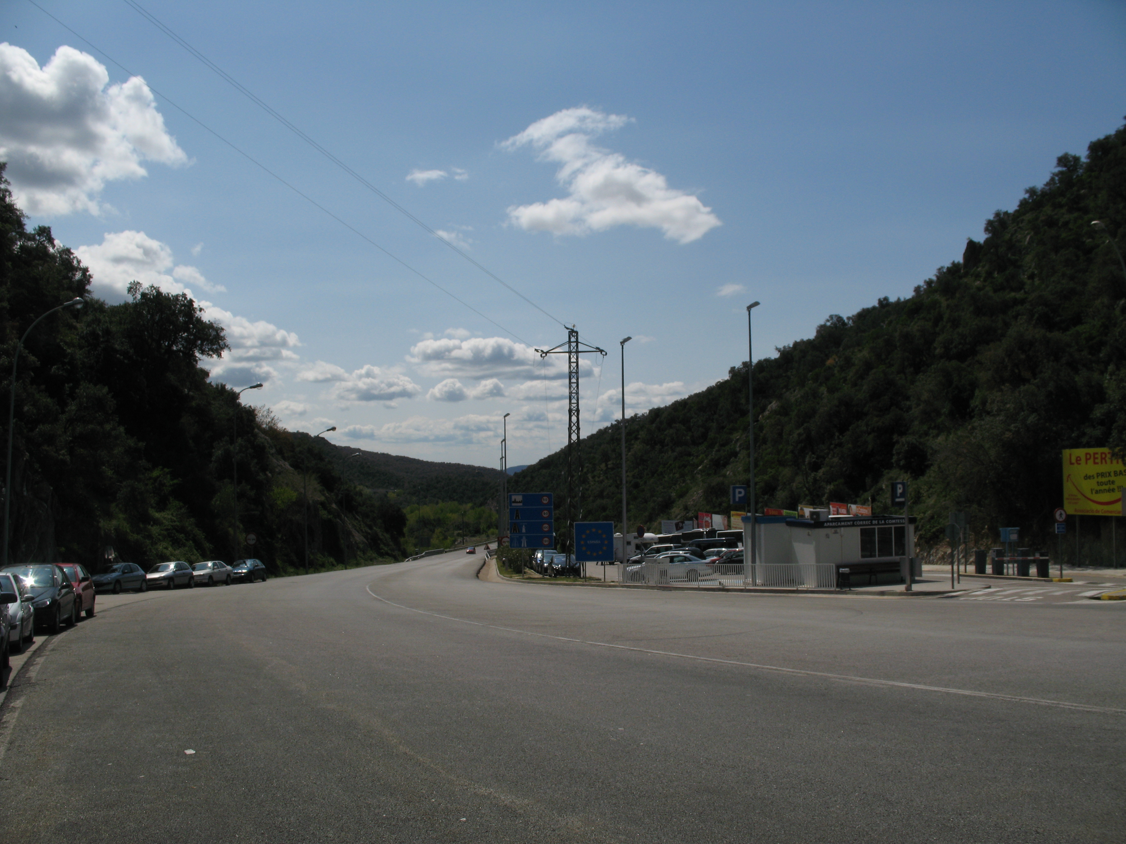 La N-II commence son parcours après le passage de la frontière espagnole.